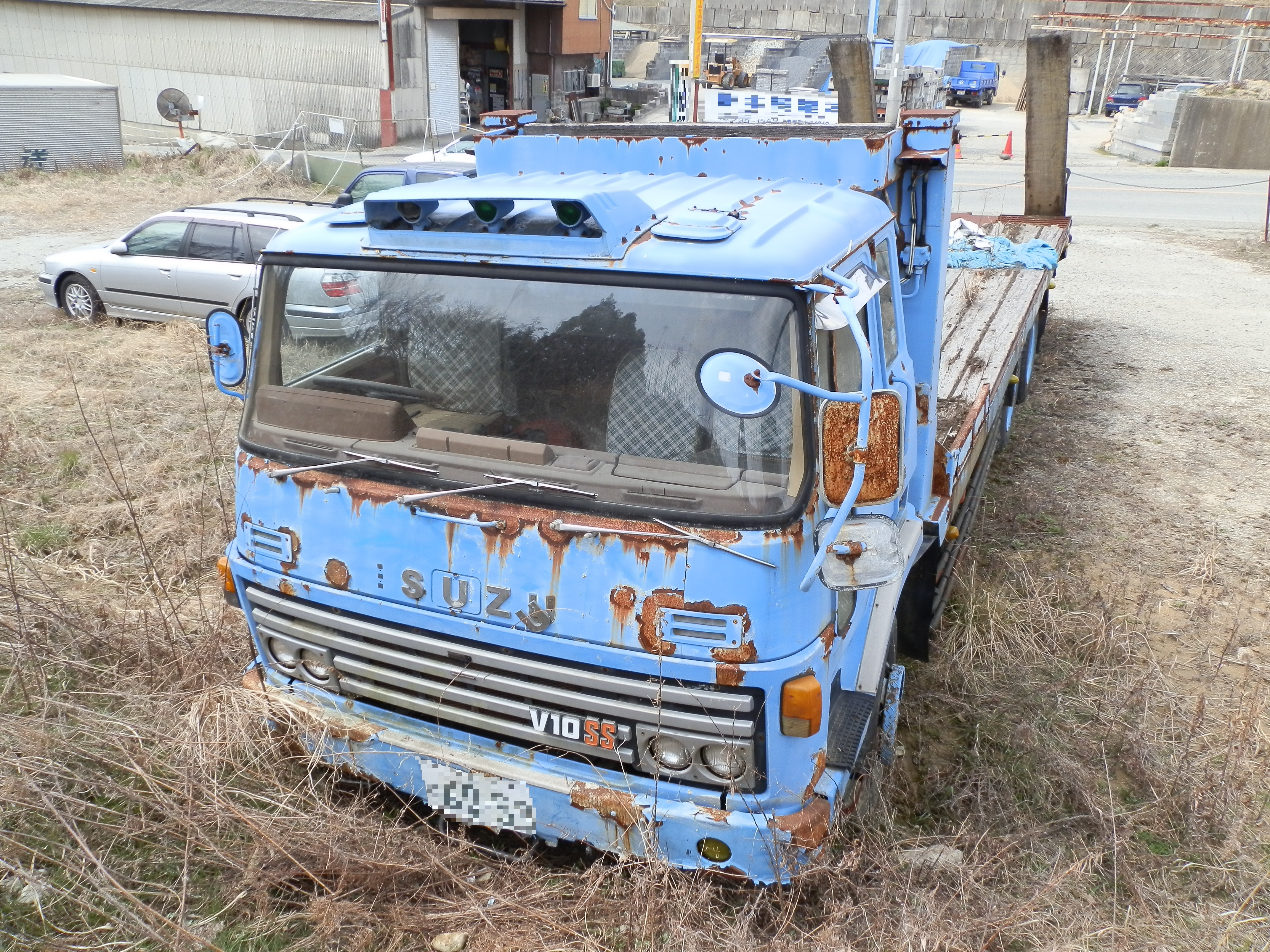 いすゞニューパワー後期型の廃車体。